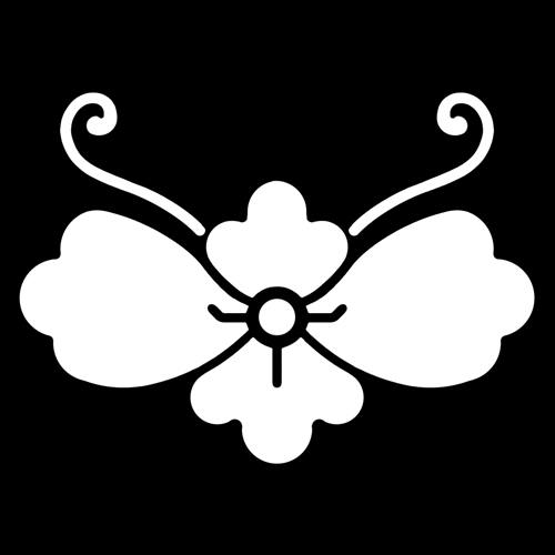 「蝶花菱」紋（染抜）